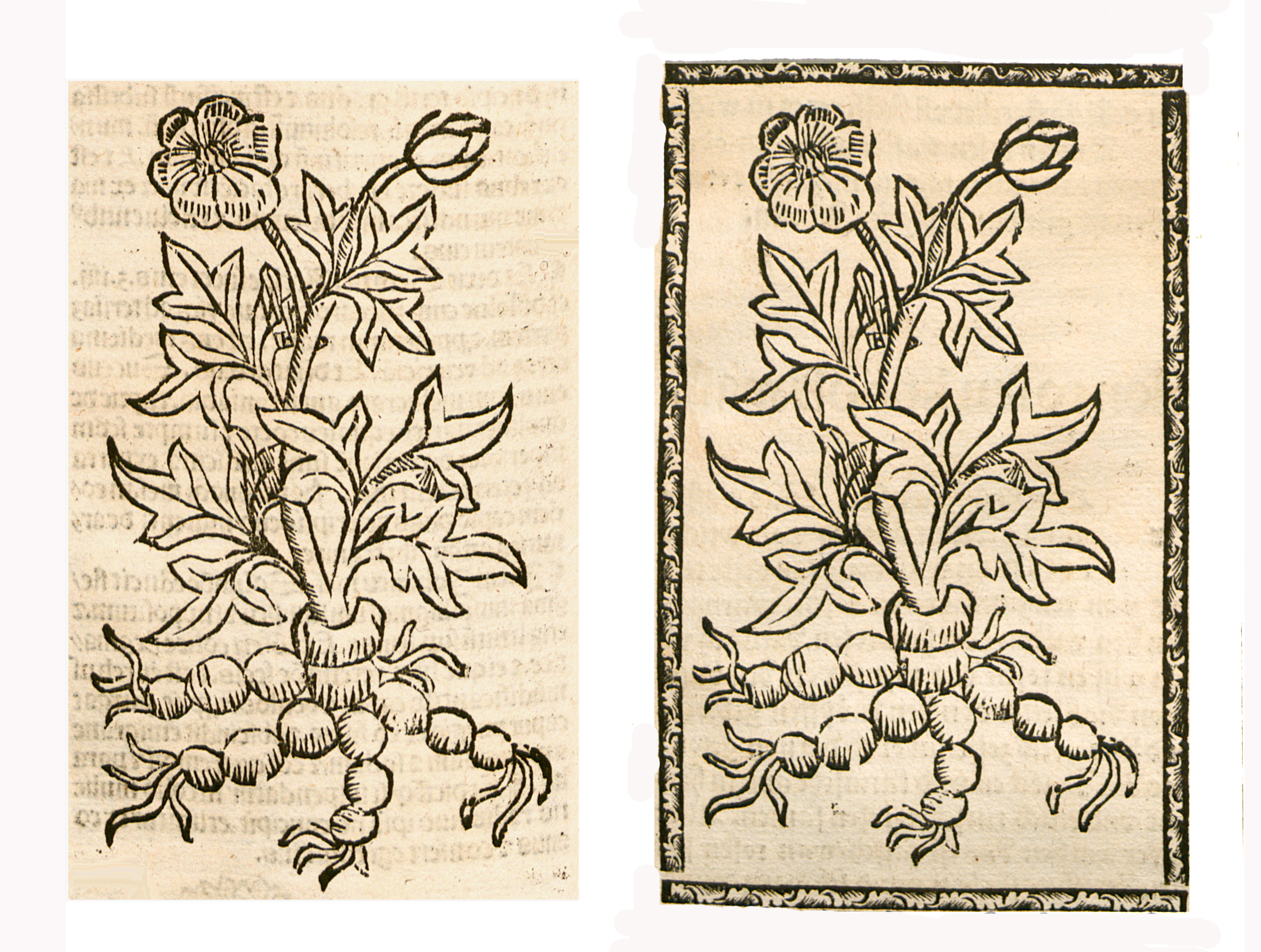 Abbildung von: Rosen, Beonien- (Paeonia officinalis)